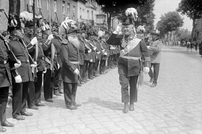 500 Jahre Deutsche Schützen ! Eine Jubelfeier für das 500 jährige Bestehen Treuenbrietzener Schützen, verbunden mit einem historischen Festzug fand am 10. Juli .....selbst statt. Der Schützenkönig schreitet die Front ab.